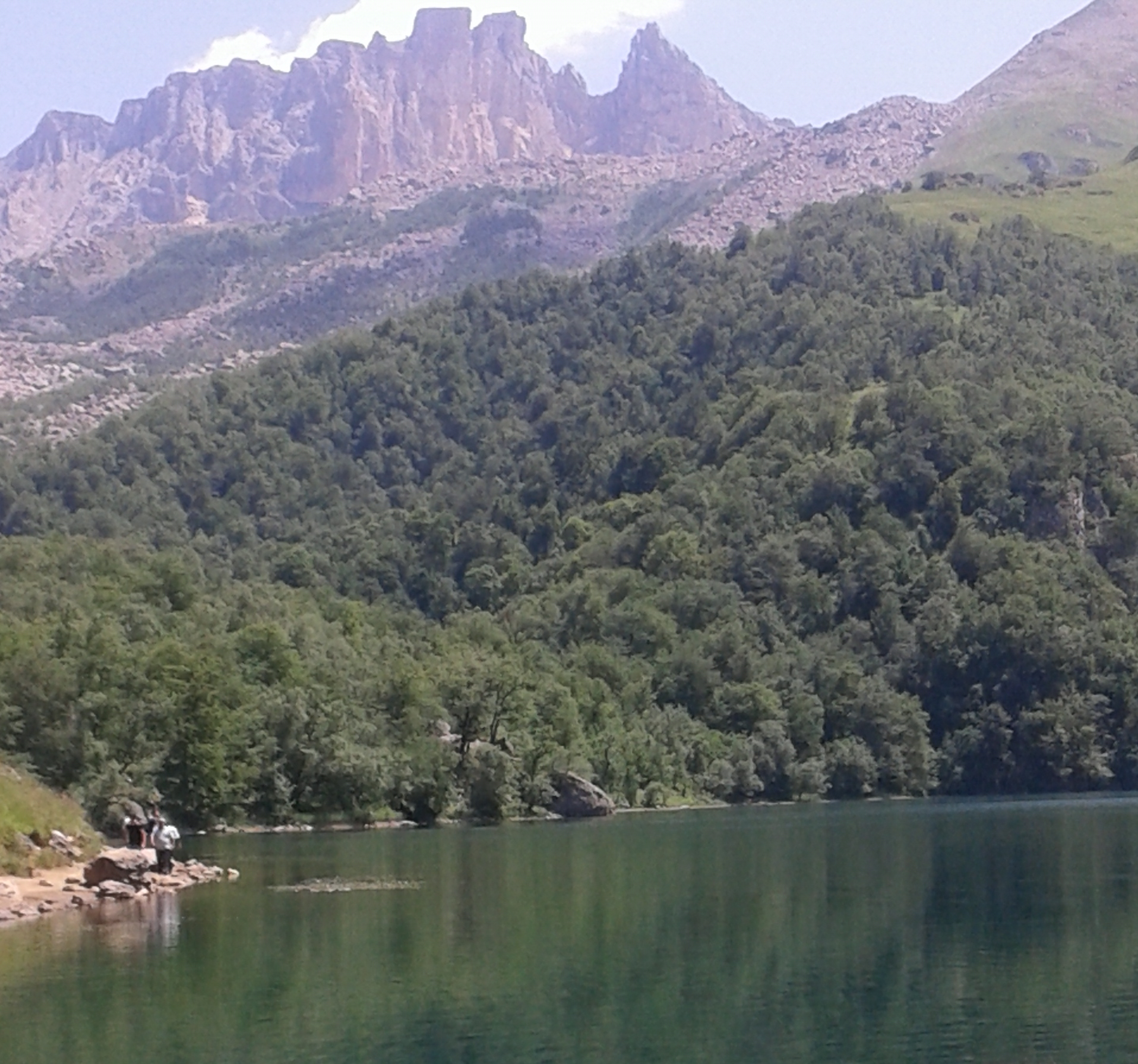 Dağ Kəpəz